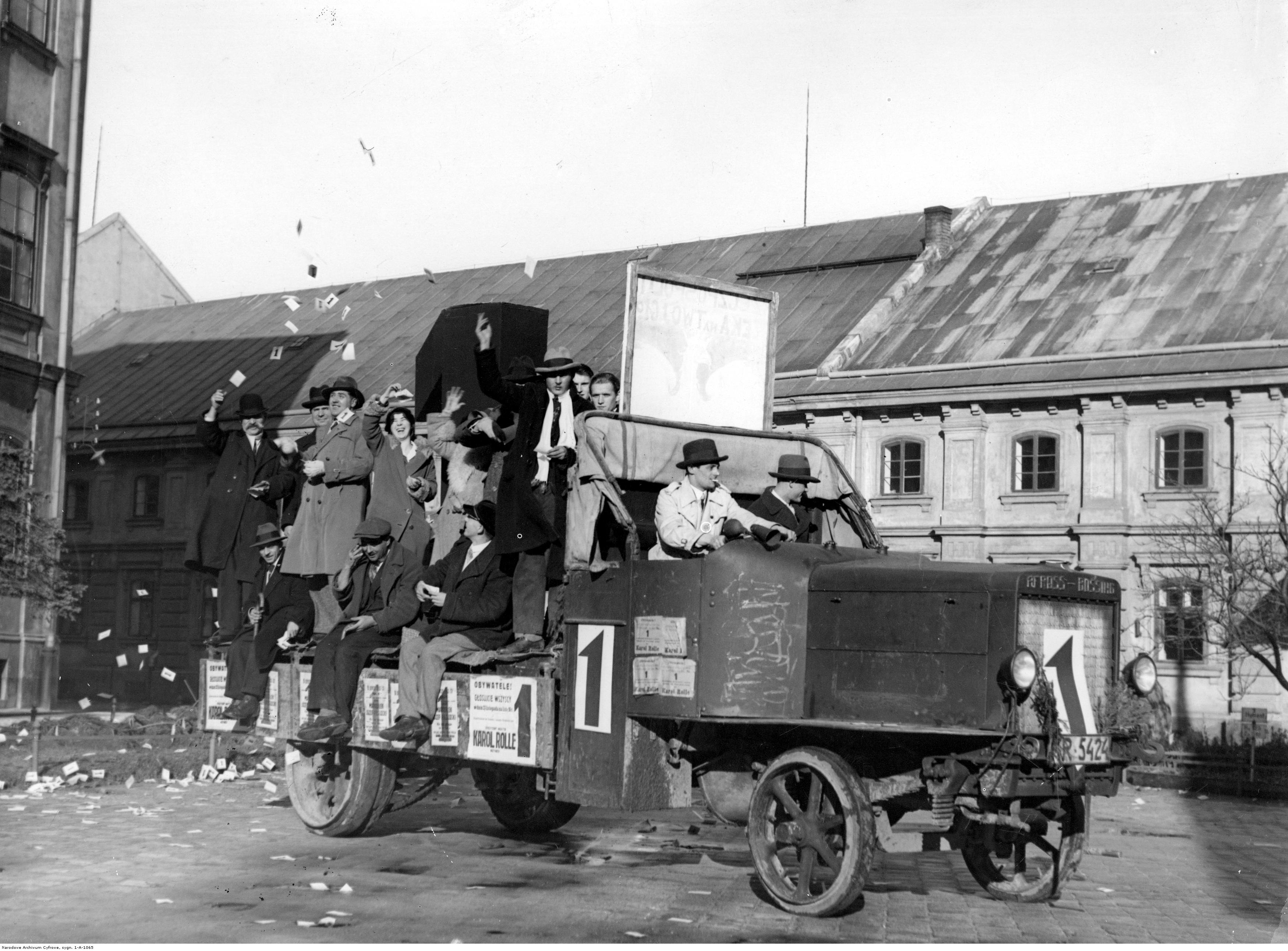 Samochód agitacyjny BBWR.